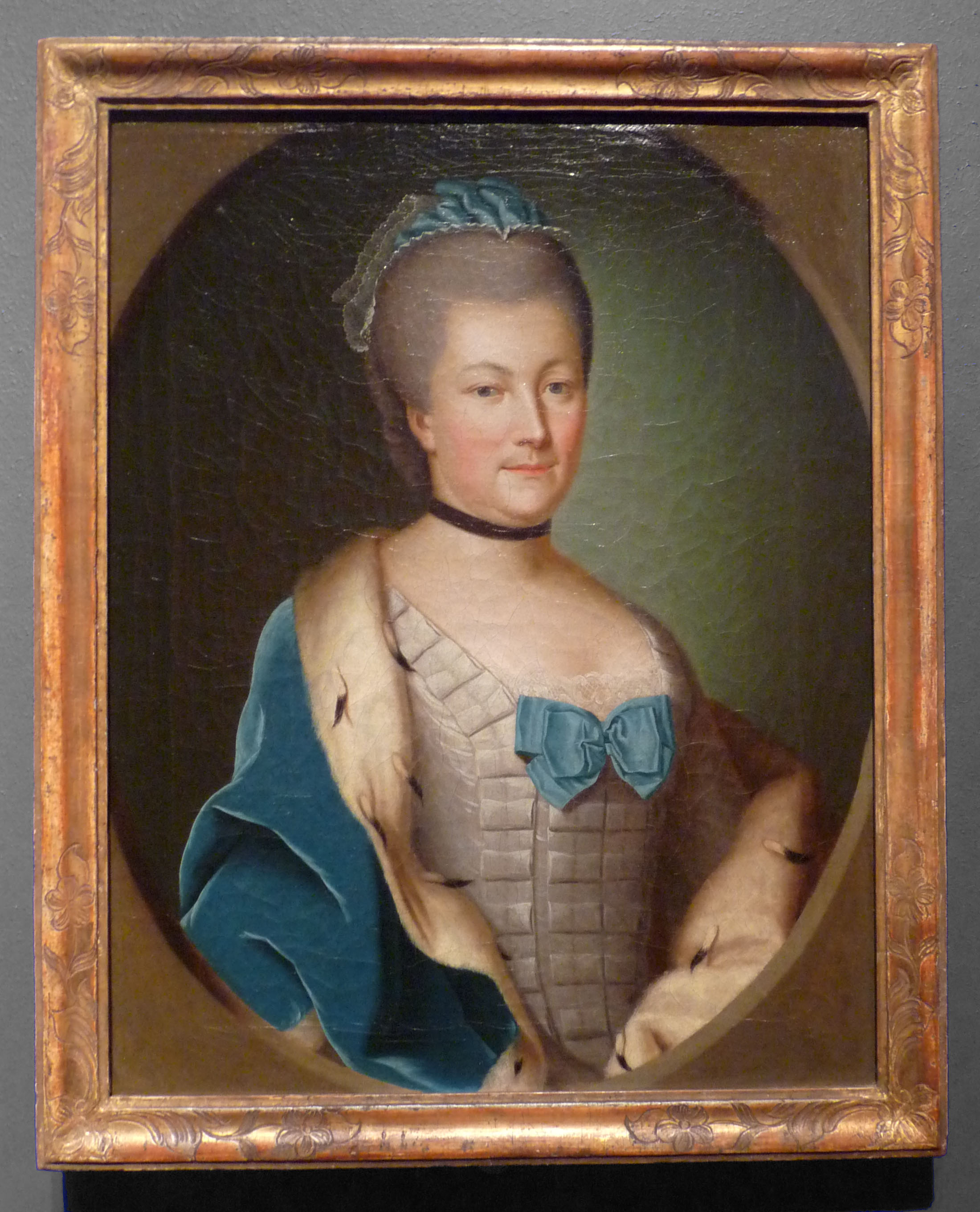 "La Grande Landgravine", Caroline-Henriette de Hesse-Darmstadt (1721-1774), épouse de Louis IX de Hesse-Darmstadt